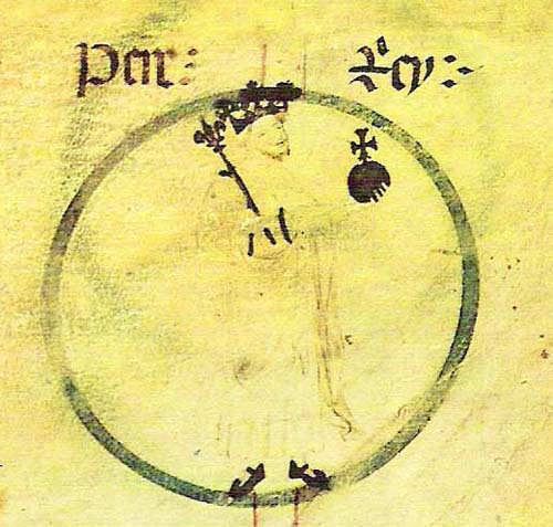 Rotlle genealògic del Monestir de Poblet